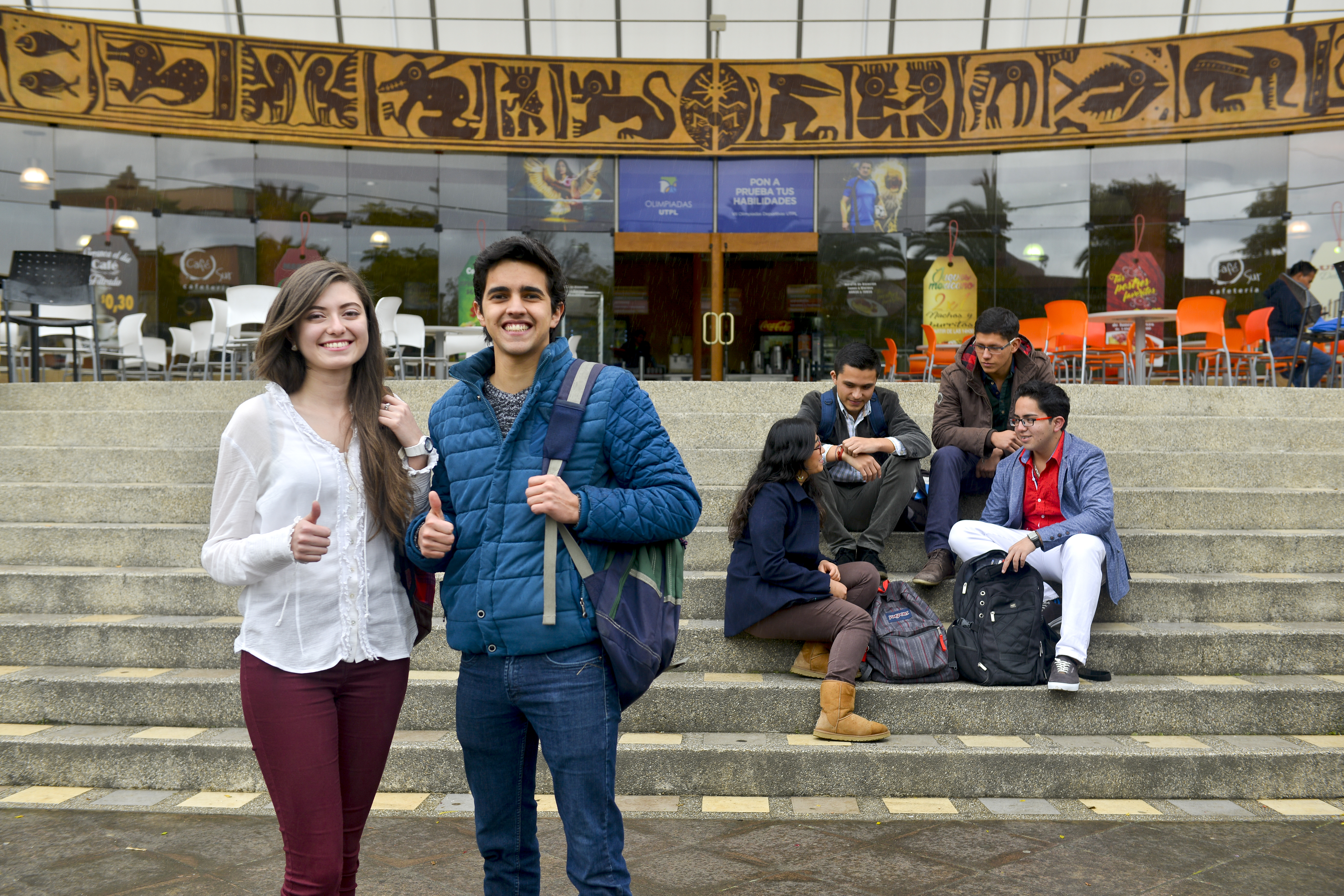 UTPL